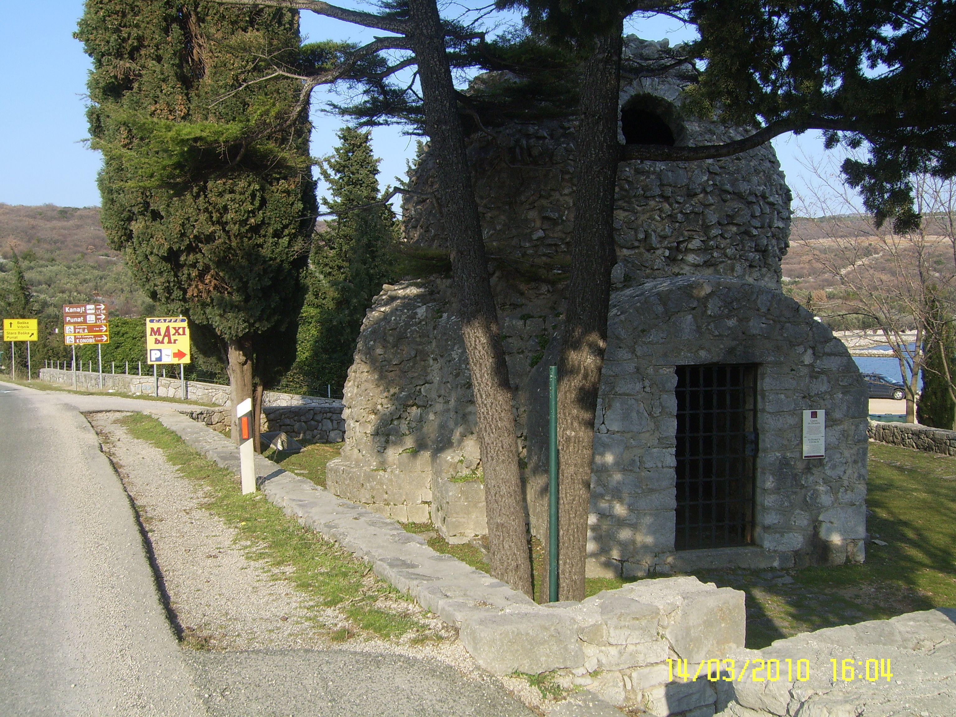 starohrvatska arhitektura, crkvica sveti Dunat kraj Punta na otoku Krku, 9. st.